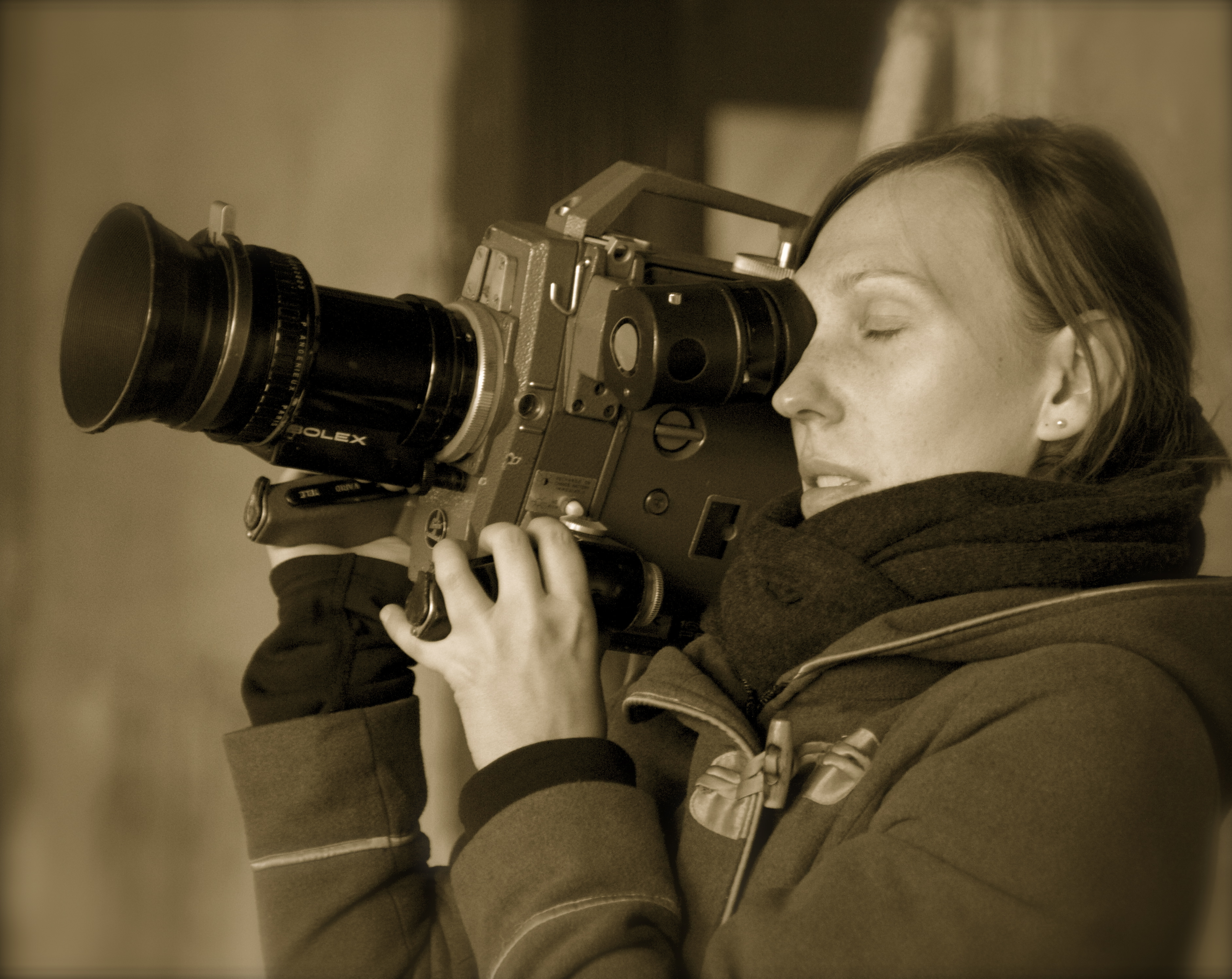 Alina Cyranek am Capa-Haus Leipzig